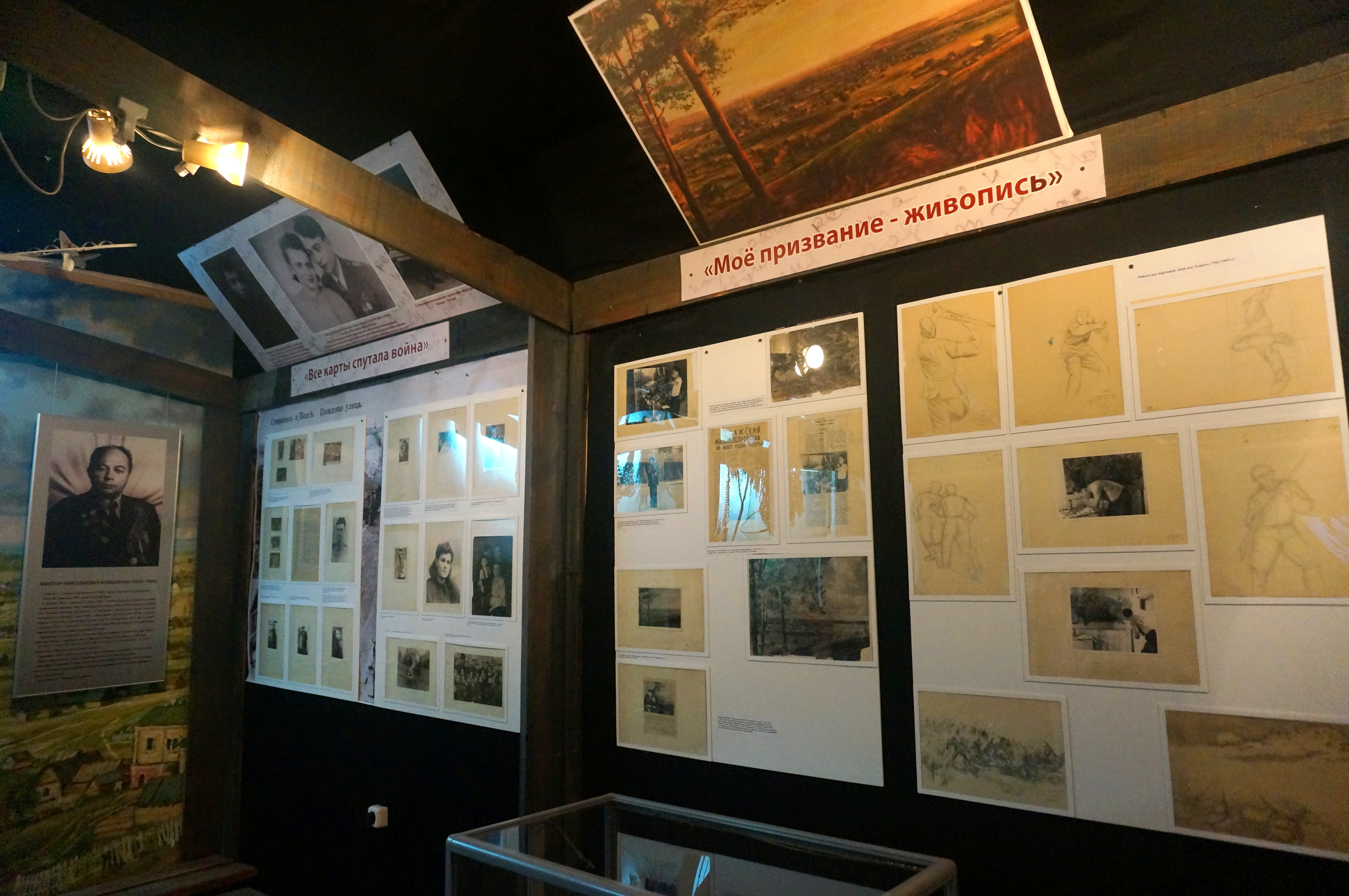 Экспозиция тольяттинского музейного комплекса "Наследие", посвященная Виктору Кувшинову